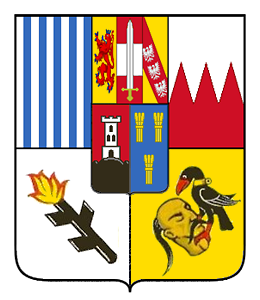 Erb Orlické větvě rodu Schwarzenbergů